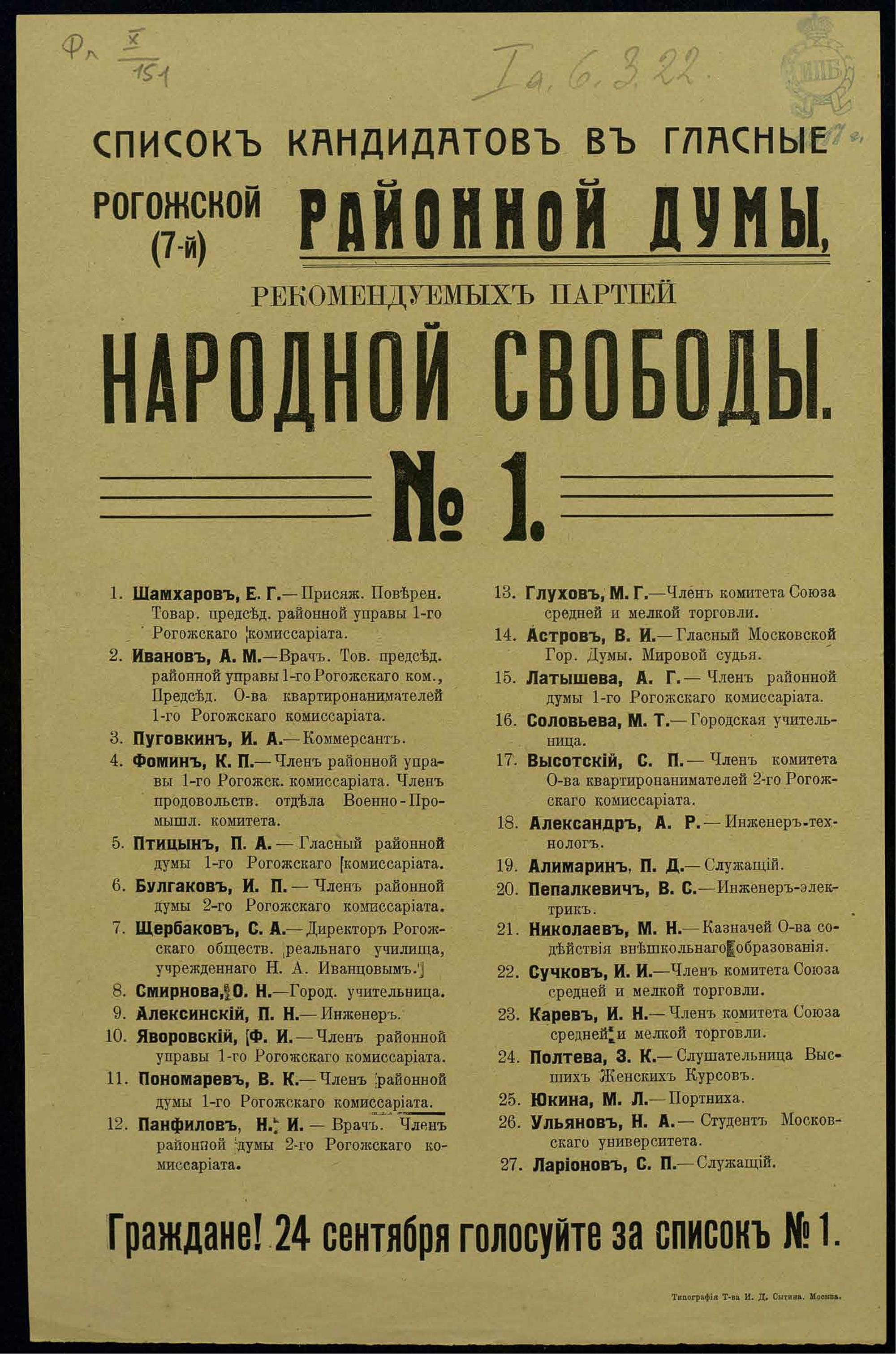 Список кандидатов в гласные Рогожской (7-й) Районной Думы, рекомендуемых партией Народной свободы N 1 (1917)